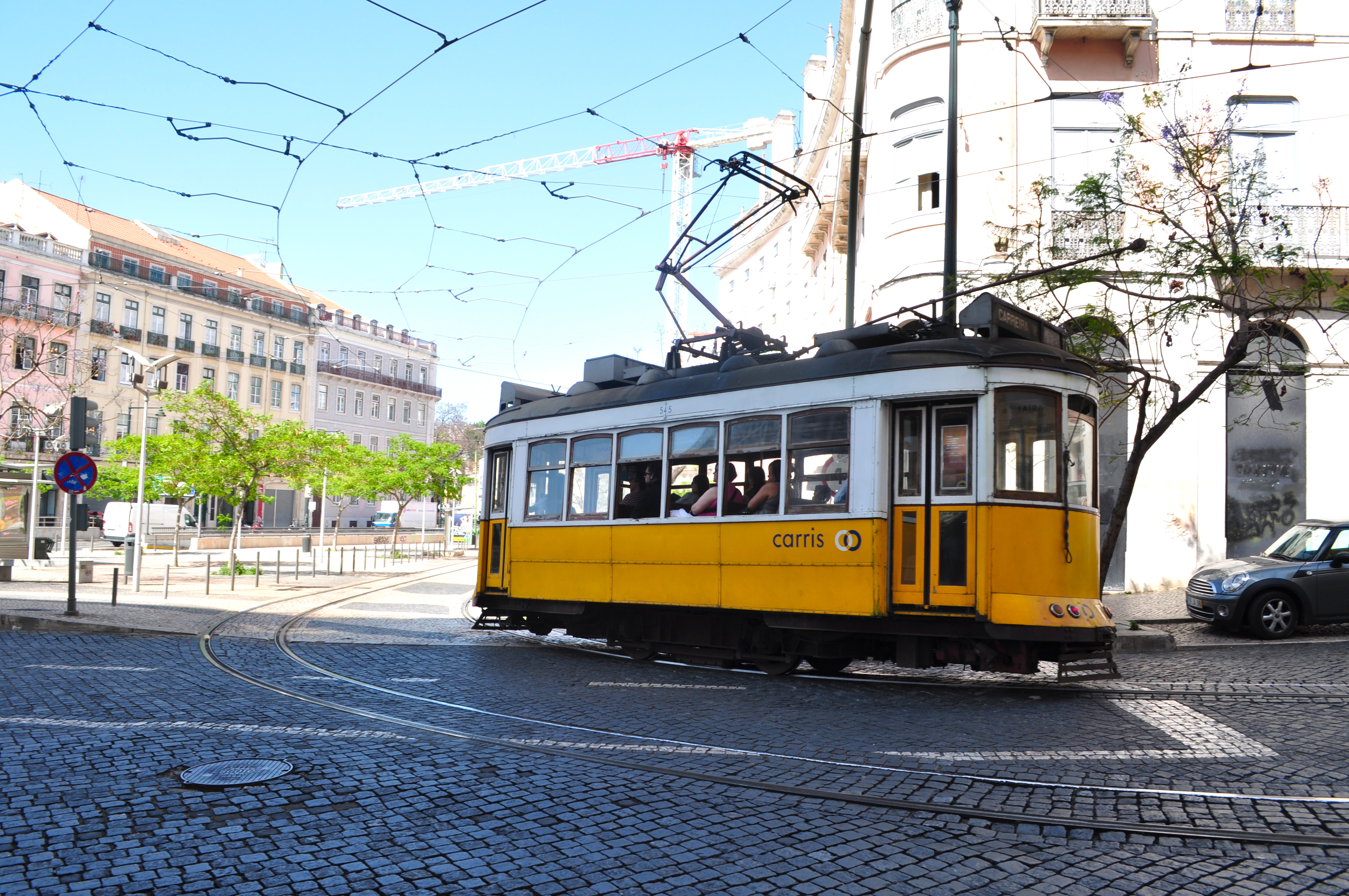 Flava tramo ĉe kurbo.